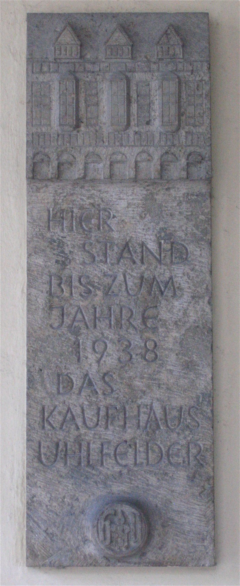 Gedenktafel zur Erinnerung an das juedische Kaufhaus Uhlfelder in München